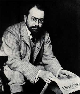 Albert Langen, uitgever München (1869-1909), pd wegens ouderdom